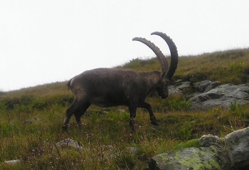 Parc National de la Vanoise, France, Ibex